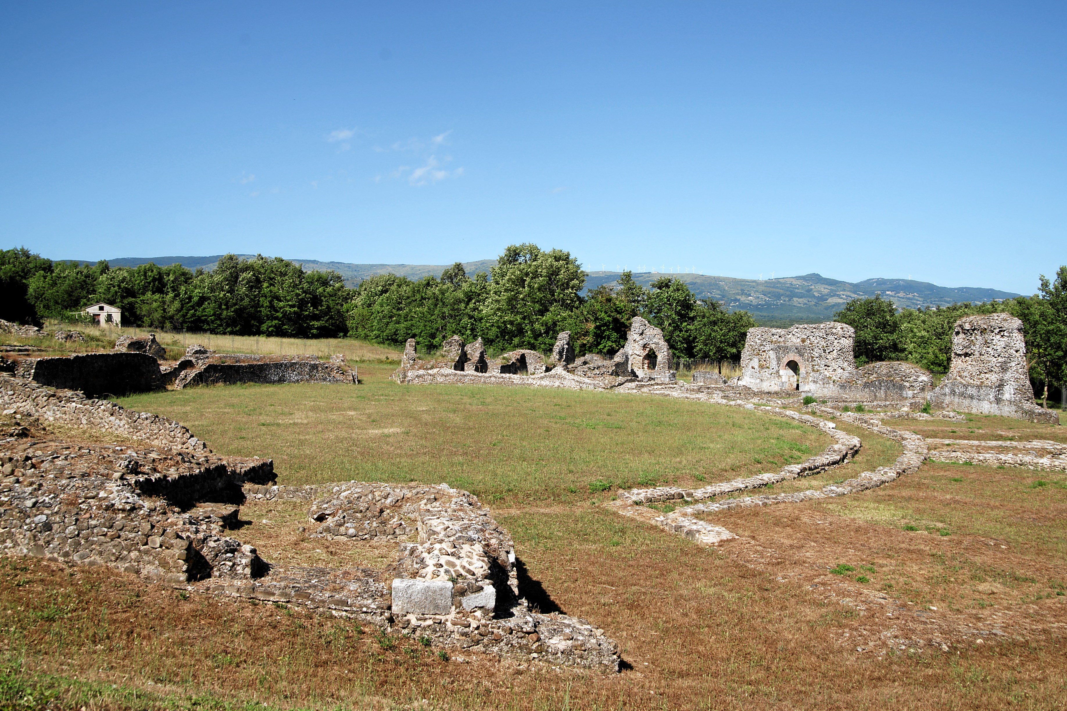 Grumentum: Amphitheater